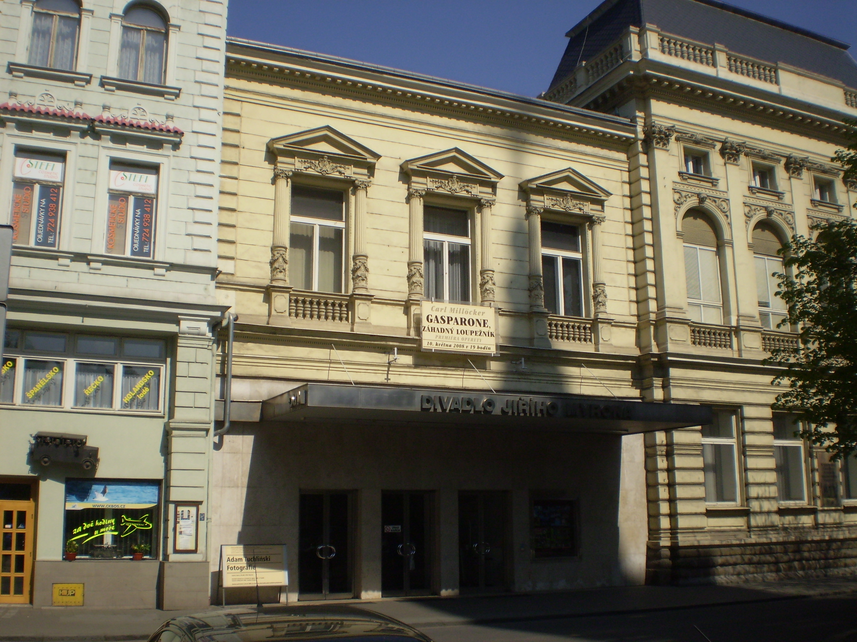 Ostravské divadlo Jiřího Myrona.